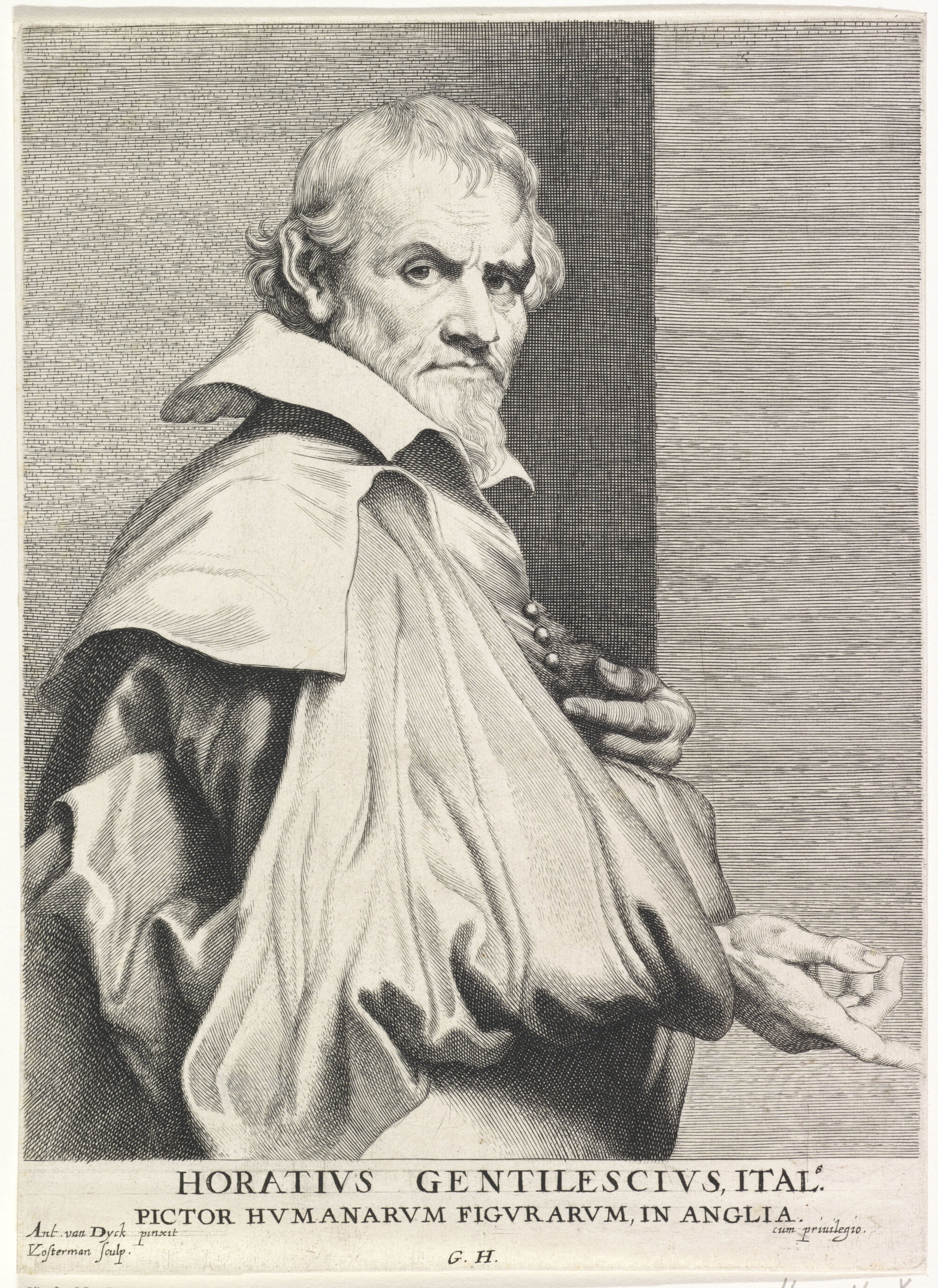 IdentificatieTitel(s): Portret van Orazio GentileschiIconographie (serietitel)Objecttype: prent Objectnummer: RP-P-OB-33.117Catalogusreferentie: Hollstein Dutch 159-5(6)New Hollstein Dutch 65-5(6)Opschriften / Merken: verzamelaarsmerk, verso linksonder, gestempeld: Lugt 240Omschrijving: Portret van de Italiaanse schilder Orazio Gentileschi.VervaardigingVervaardiger: prentmaker: Lucas Vorsterman (I) (vermeld op object)naar schilderij van: Anthony van Dyck (vermeld op object)uitgever: Gilles Hendricx (vermeld op object)verlener van privilege: Spaanse kroon (vermeld op object)verlener van privilege: onbekend (vermeld op object)Plaats vervaardiging: AntwerpenDatering: 1645 - 1646Fysieke kenmerken: gravureMateriaal: papier Techniek: graveren (drukprocedé)Afmetingen: blad: h 243 mm × b 176 mmToelichtingPrent gebruikt voor: Icones principum, virorum doctorum, pictorum, chalcographorum, statuariorum nec non amatorum pictoriae artis numero centum ab Ant. van Dyck ad vivum expressae ejusque sumptibus aeri incisae. Antwerpen: Gillis Hendricx, [1645-1646].OnderwerpWie: Orazio GentileschiVerwerving en rechtenVerwerving: overdracht van beheer 1816Copyright: Publiek domein